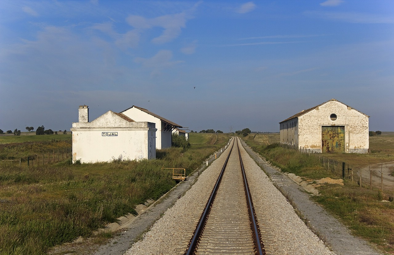 Localizada na linha de Évora, esta estação deixou de estar afecta à rede, não constando nos registos oficiais da Refer.